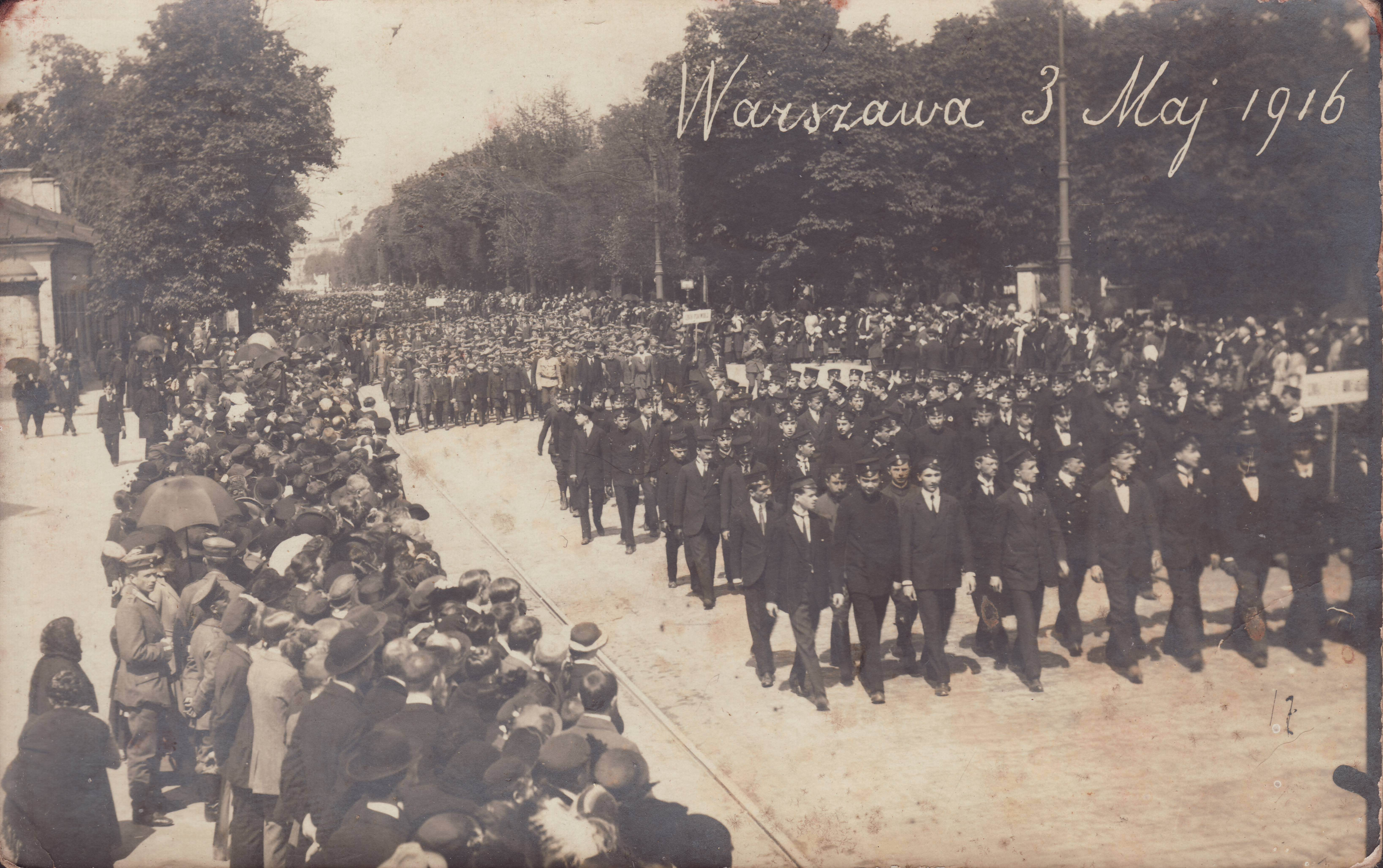 Parada 3 Majowa w Warszawie w 1916 roku.